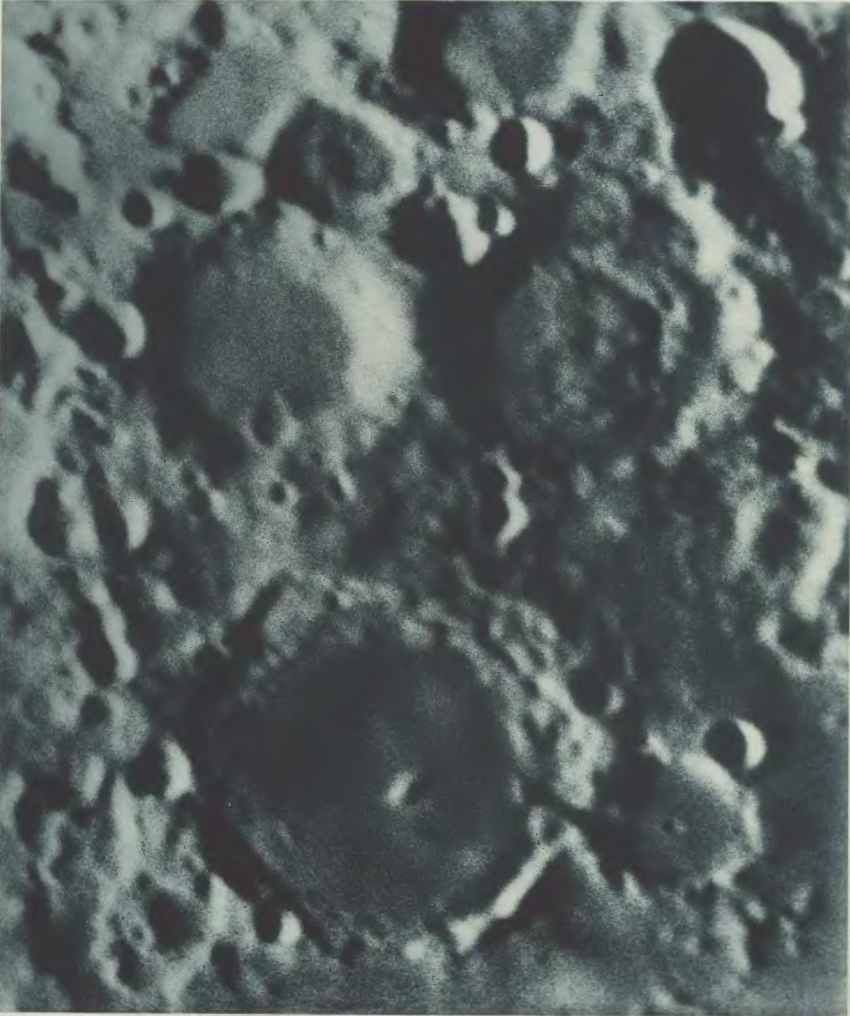 Photographischer Mond-Atlas vornehmlich auf Grund von focalen Negativen der Lick-Sternwarte im Massstabe eines Monddurchmessers von 10 Fuss ausgeführt von Professor Ladislaus Weinek. Heft IX. Tafel 161